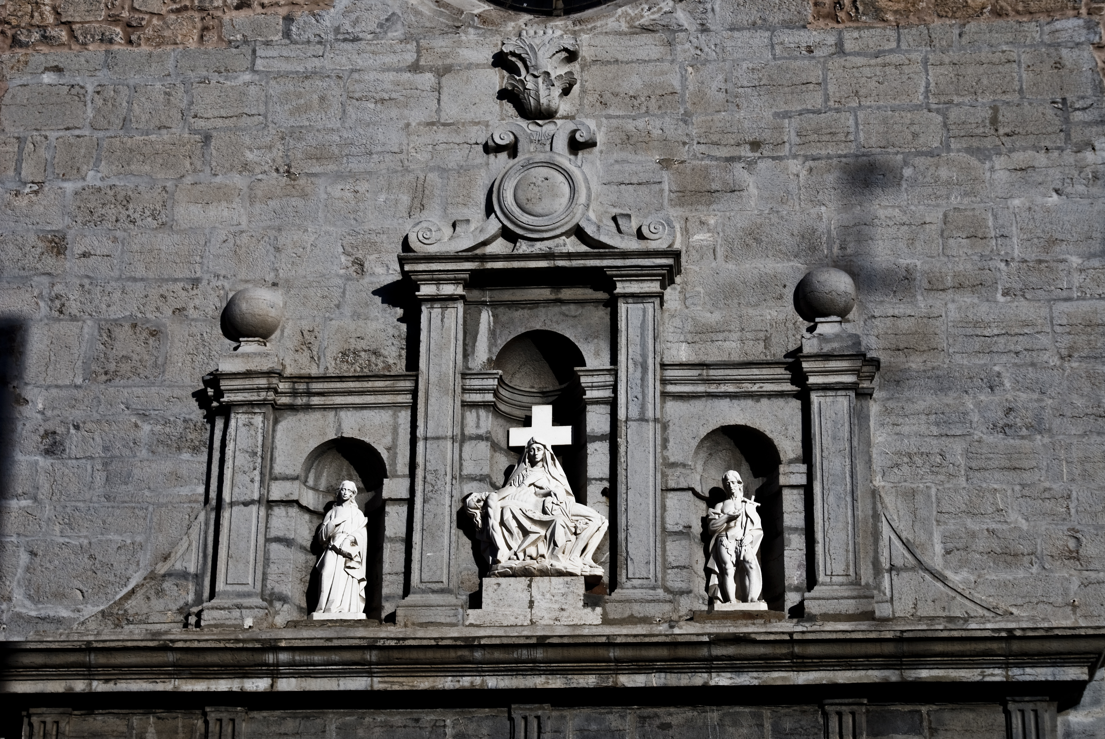 Detall de les imatges de la façana de l'esglèsia dels Sants Joans